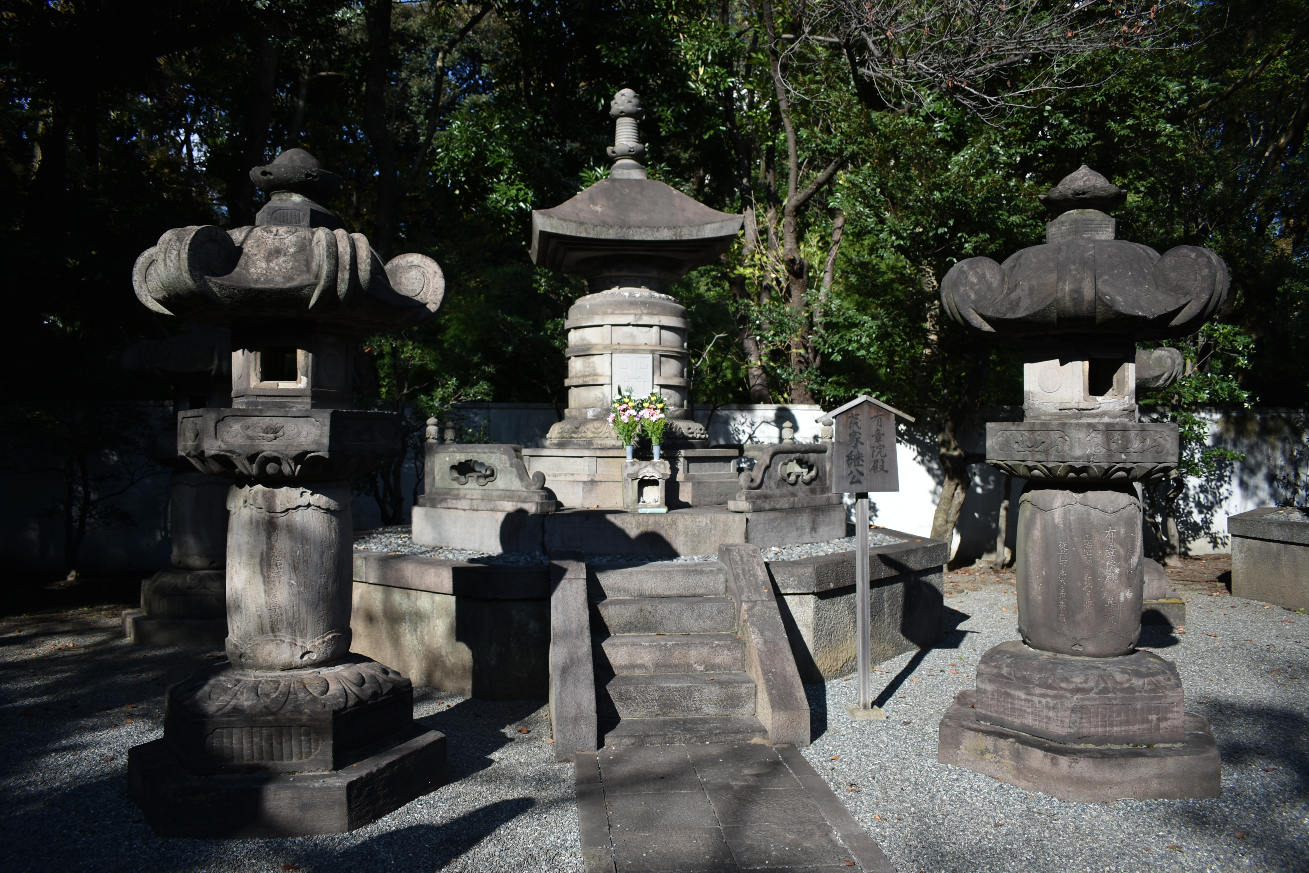 増上寺 御霊屋